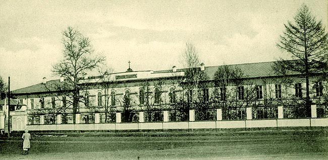 Здание Иркутской духовной семинарии